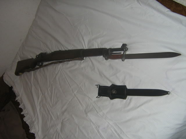 Fusil manual "Mosquetón" 1954